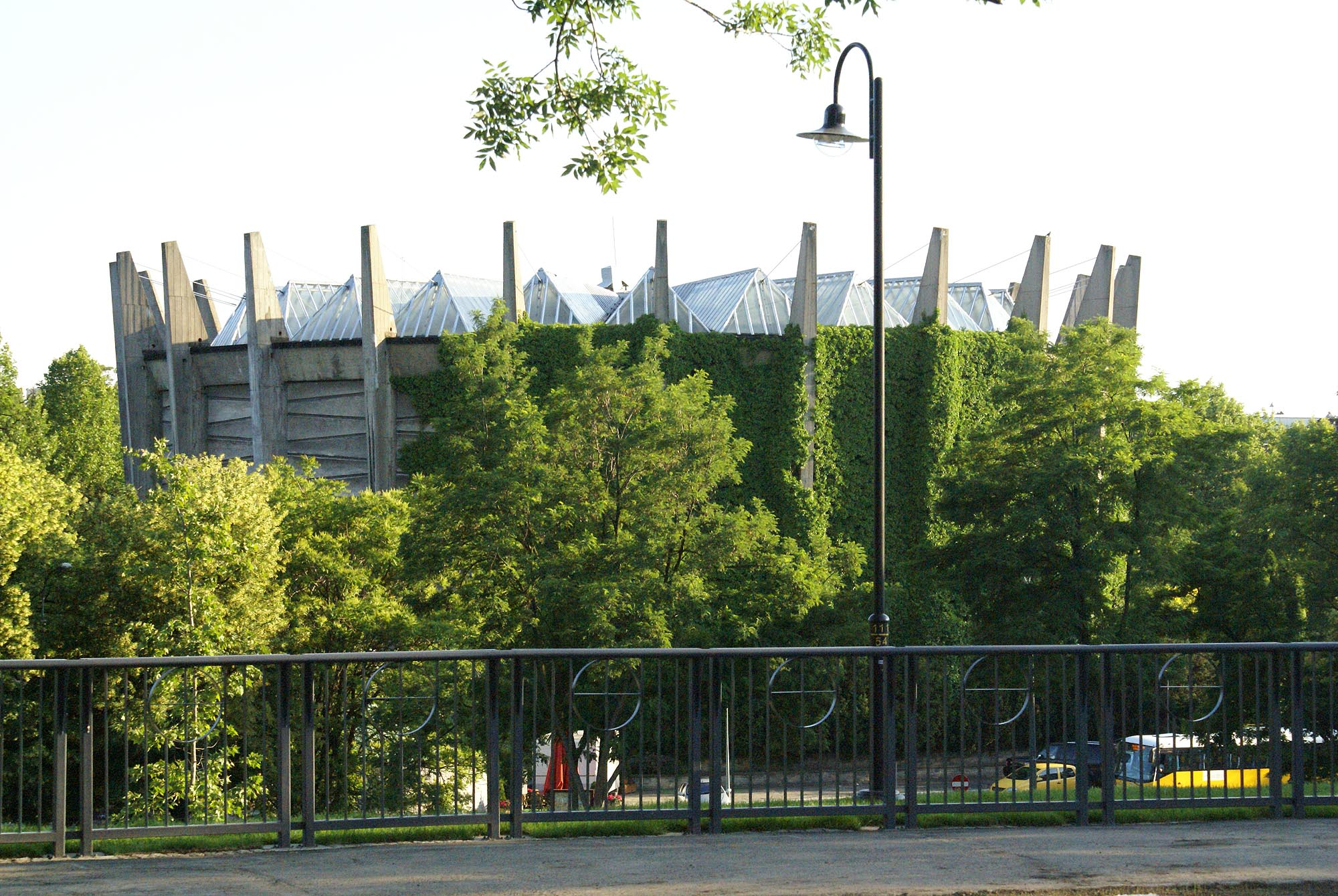 Wrocław, zespół budynków Panoramy Racławickiej z otoczeniem (teren)